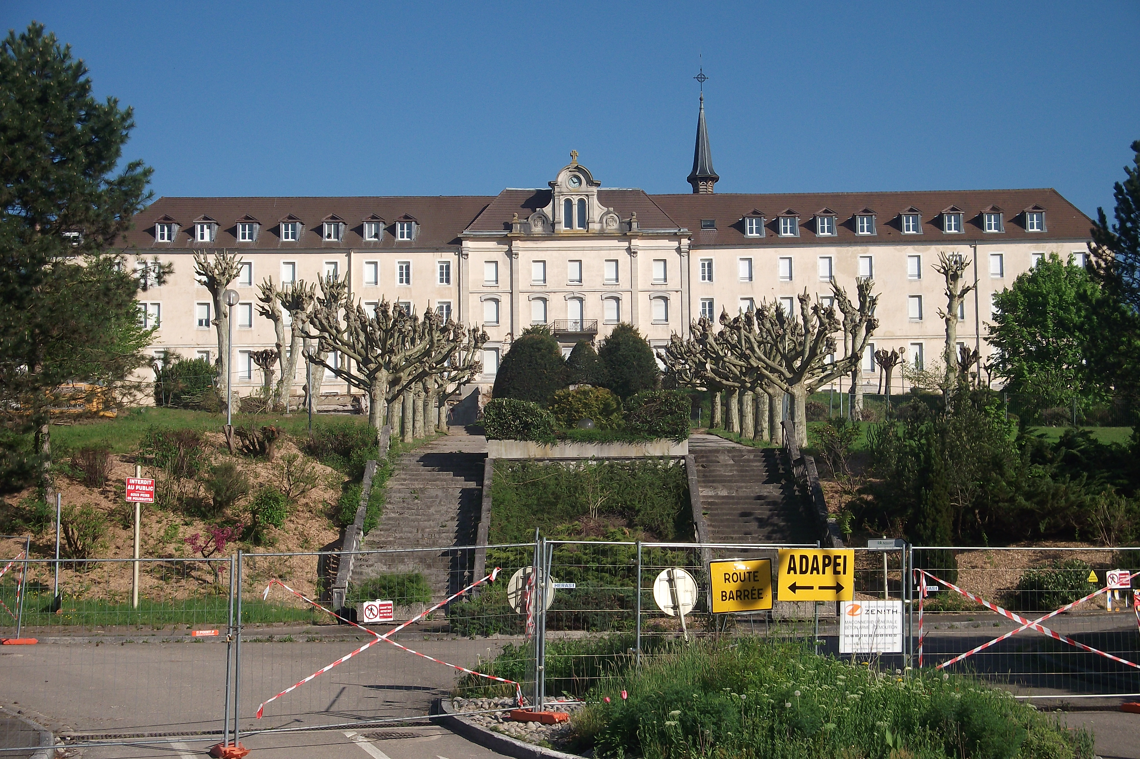 L'hôpital Paul-Morel de Vesoul (Haute-Saône, Franche-Comté)